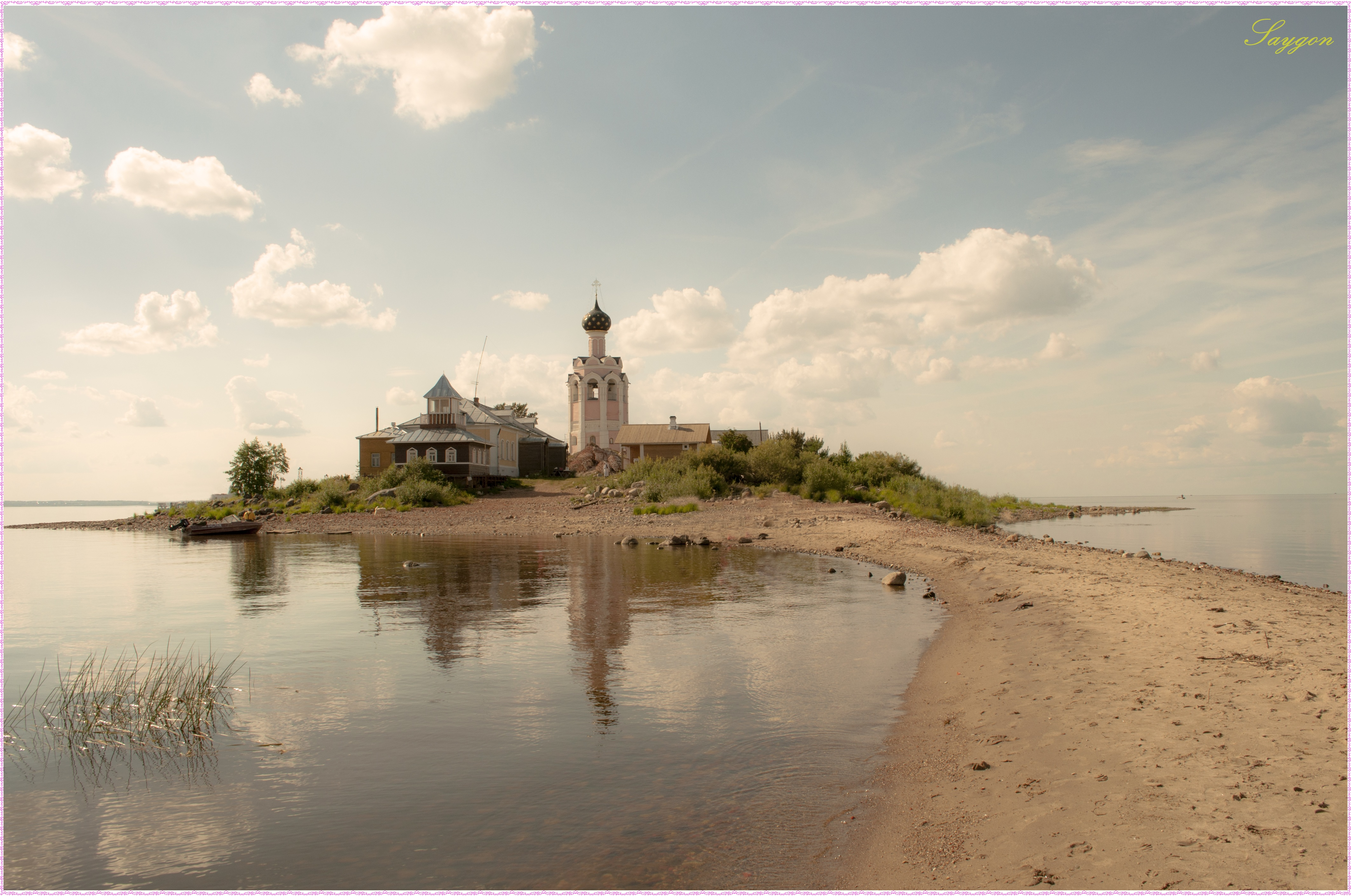 Спасо-Каменный монастырь (колокольня и остатки древних зданий) (Вологодская область, Каменный остров на Кубенском озере).